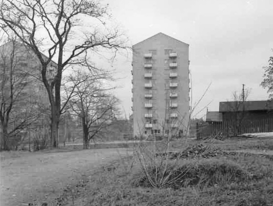 Exteriör mot söder, kyrkogårdens f d utsträckning, numera park. T h inhägnaden med bevarade gravstenar. I bakgrunden Olaus Magnus väg. Kategori: (01) Exteriörer, detaljer Exteriör mot söder, kyrkogårdens f d utsträckning, numera park. T h inhägnaden med bevarade gravstenar. I bakgrunden Olaus Magnus väg.